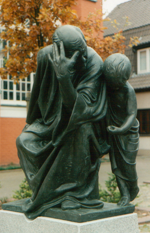 Liborius, Bronze-Skulptur von Carsten Eggers,wurde 1993 in Bremervörde enthüllt